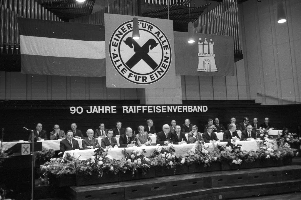 im Schloss. Im Bild das Präsidium sitzt u.a. der schleswig-holsteinische Verbandspräsident Johannes Hansen (6.v.l.).